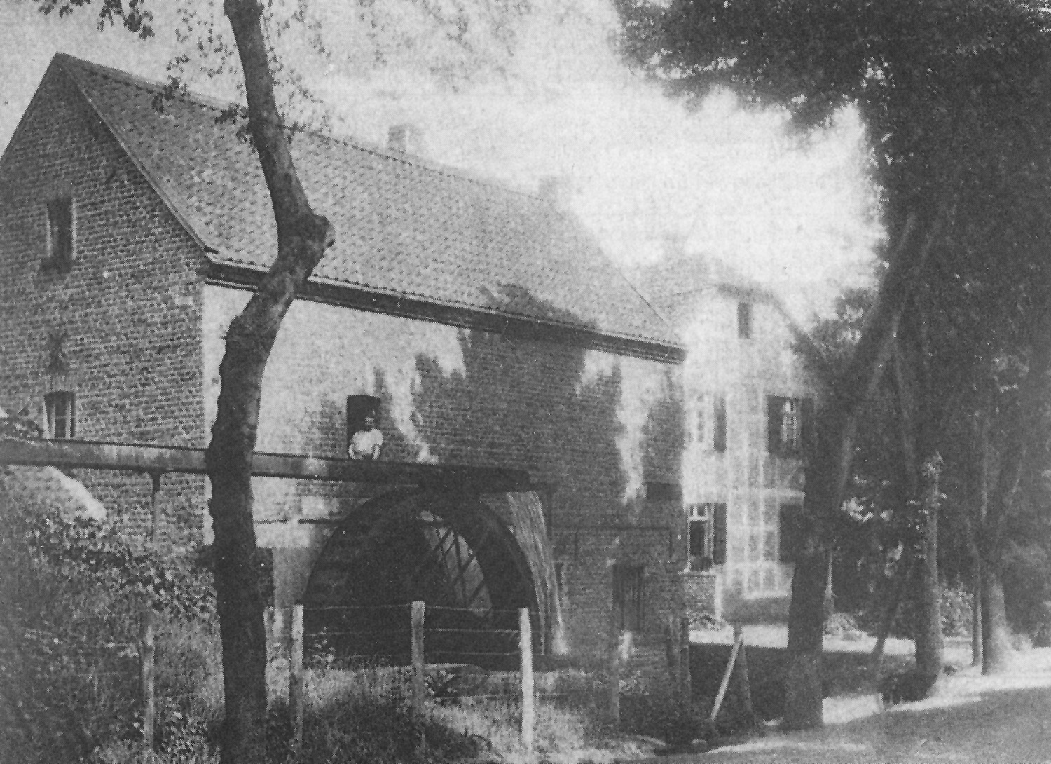 Hürth - Mühlen im Raum Hürth